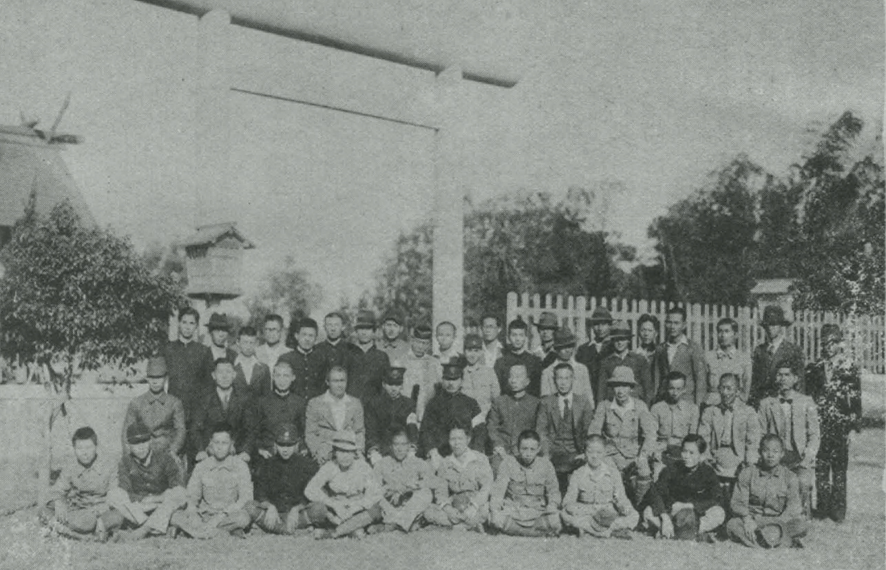 中文（台灣）: 臺灣產業組合協會曾文郡部會、曾文郡下產業組合職員參拜曾文神社之紀念合影